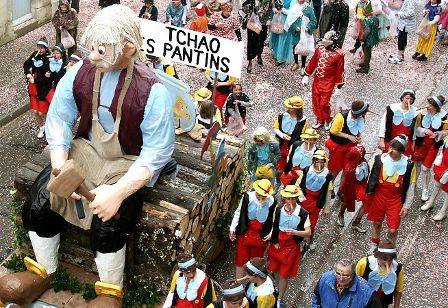 AuteurJoelp 16 décembre 2005 à 21:35 (CET) Summary Le Carnaval de WASSY